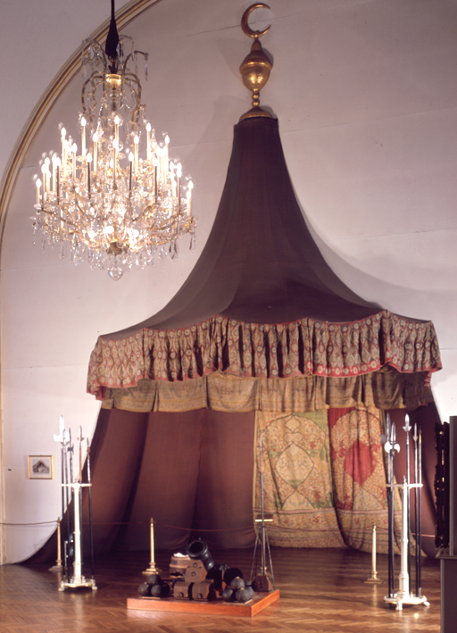 Türkisches Staatszelt im Heeresgeschichtlichen Museum in Wien